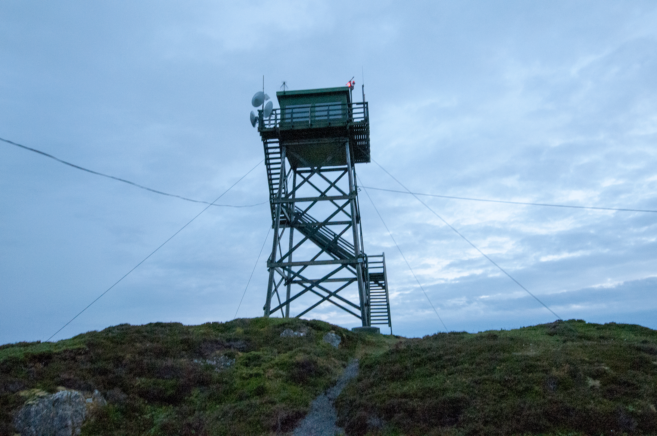 Observatørtårn i skytefeltet på Karsløya i øygruppen Tarva